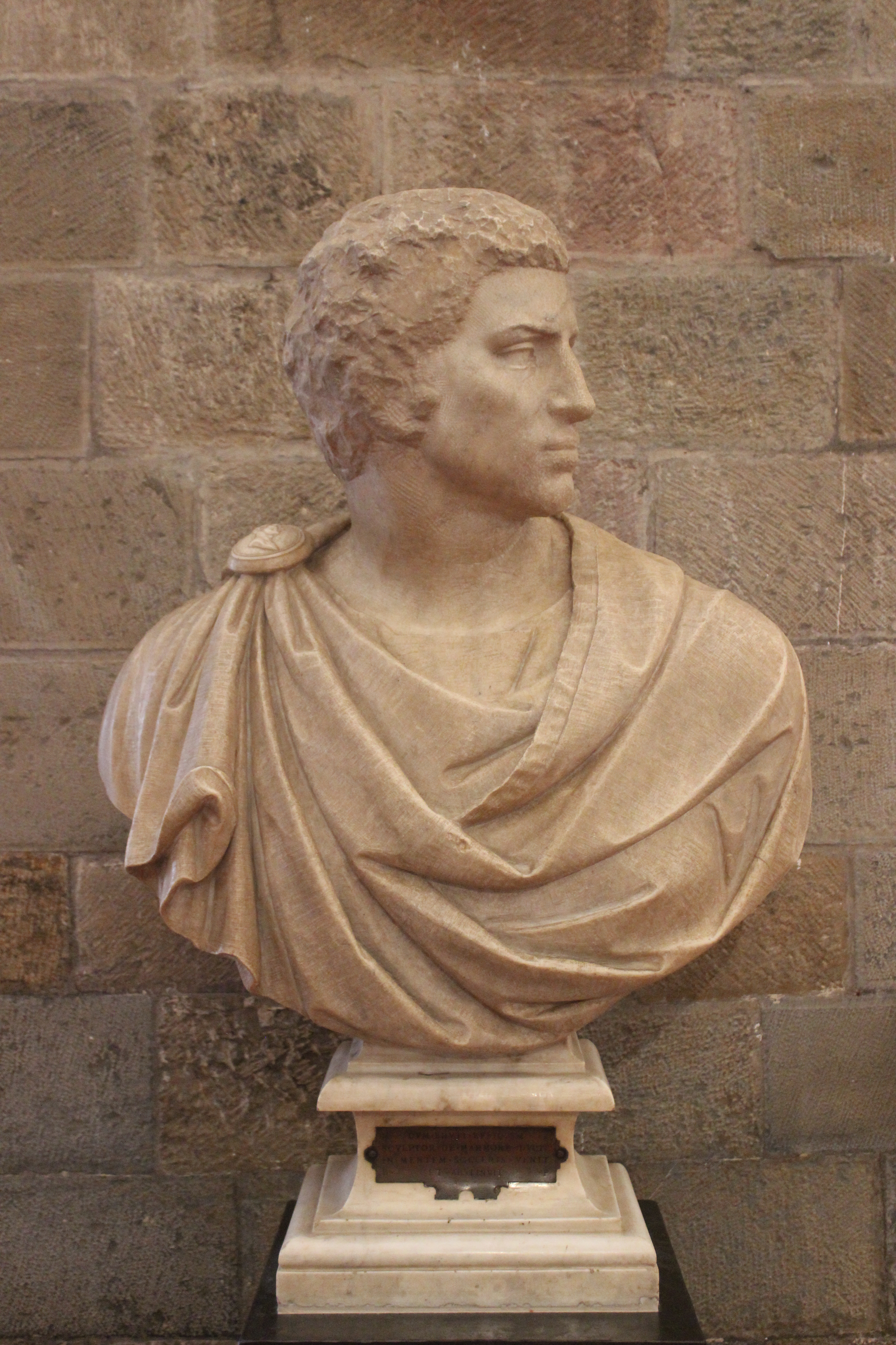 Museo del Bargello. Bruto, por Miguel Ángel.